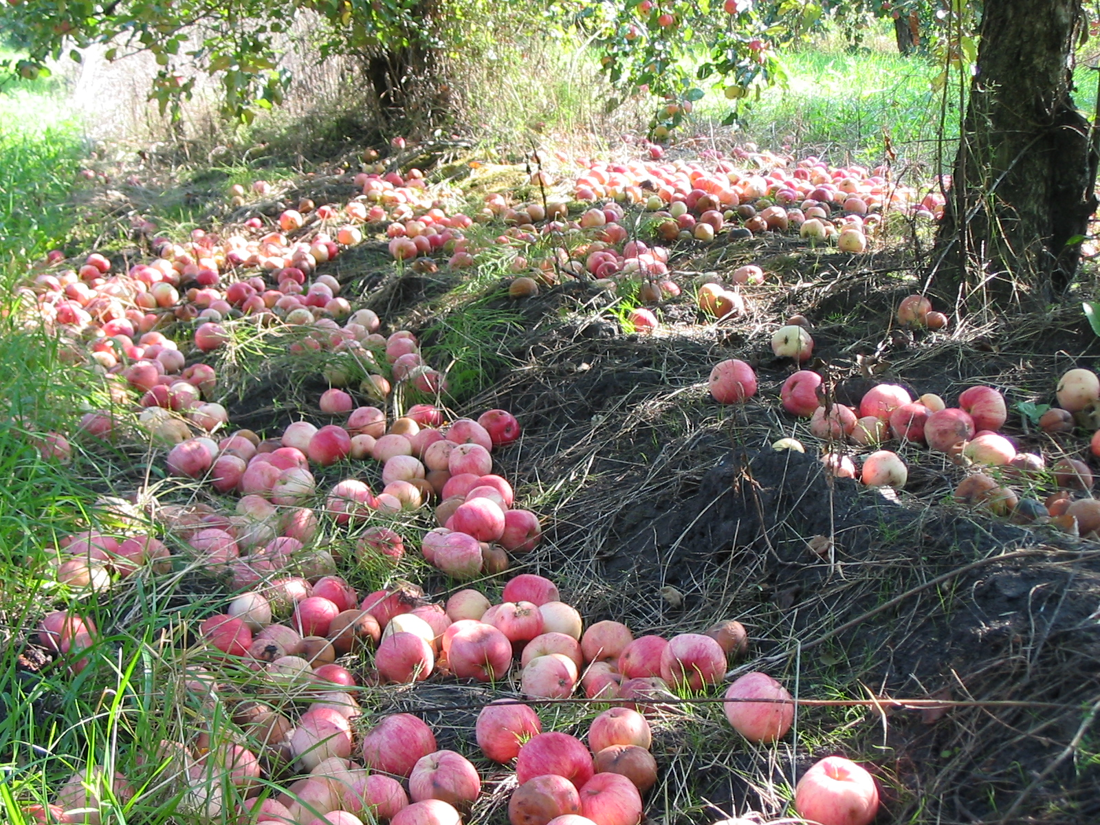 Корочанские сады. Из коллекции экологической организации «Родники Белогорья».